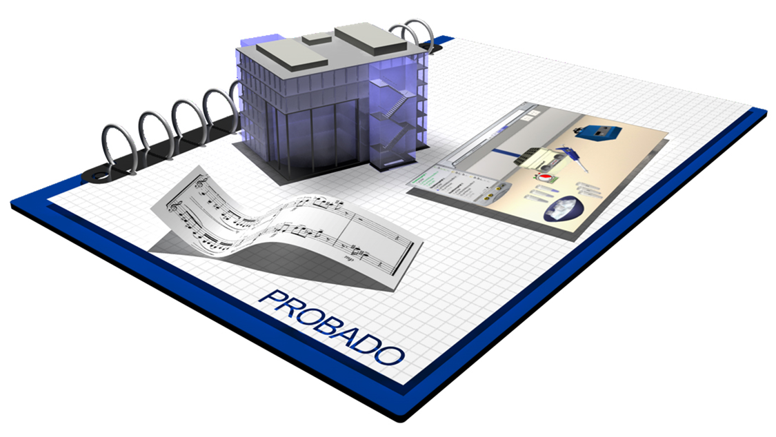 Logo des Projekts Probado